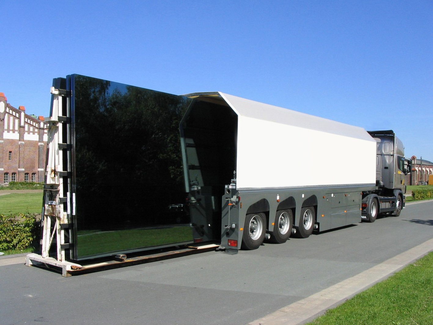 Innenlader zur Beförderung von stehenden Flachglas-Paletten